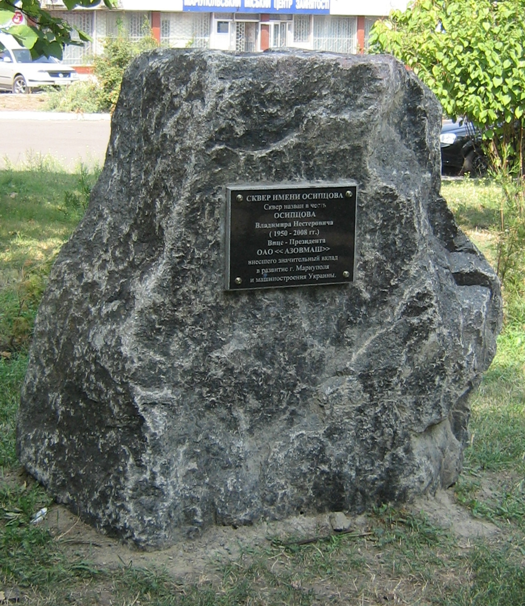 Сквер Овипцова